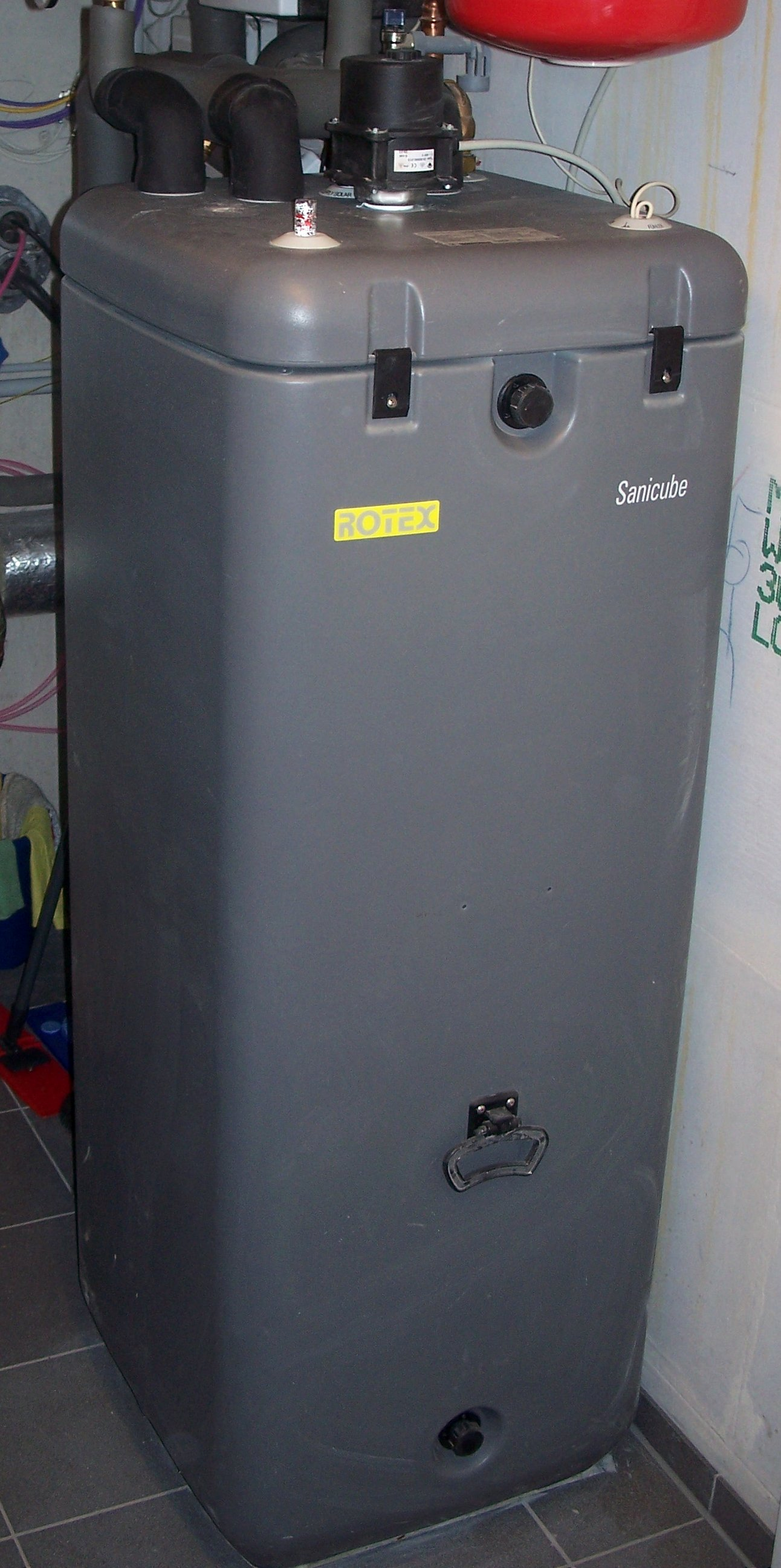 Solarspeicher mit 300l Fassungsvermögen nach dem Durchlauferhitzer-Prinzip (Der Tank enthält nur Speicherwasser, ein Wärmeübertrager speichert die Solarenergie ein, ein weiterer dient zur Trinkwassererwärmung).